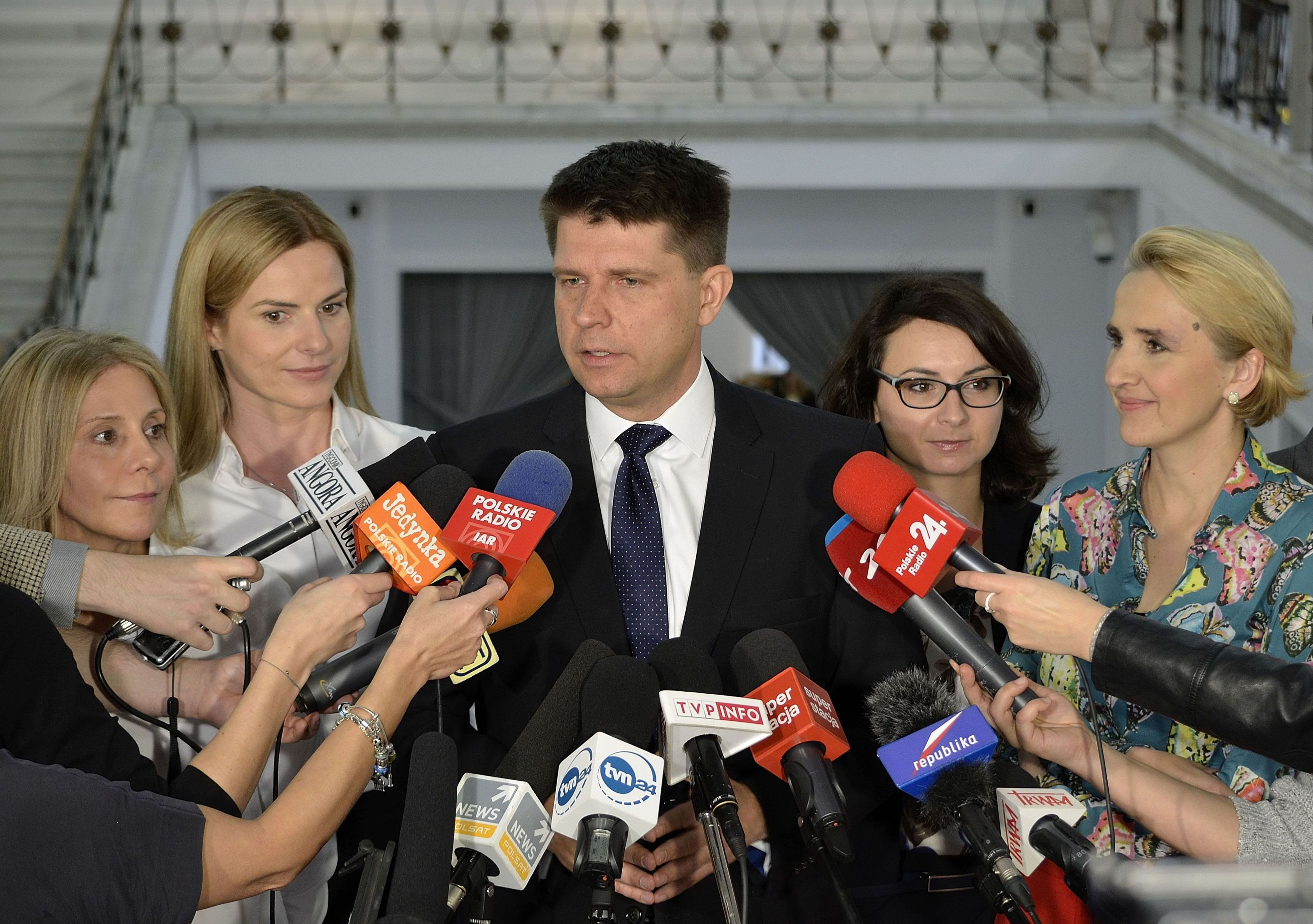 Poseł Ryszard Petru podczas konferencji prasowej w Sejmie